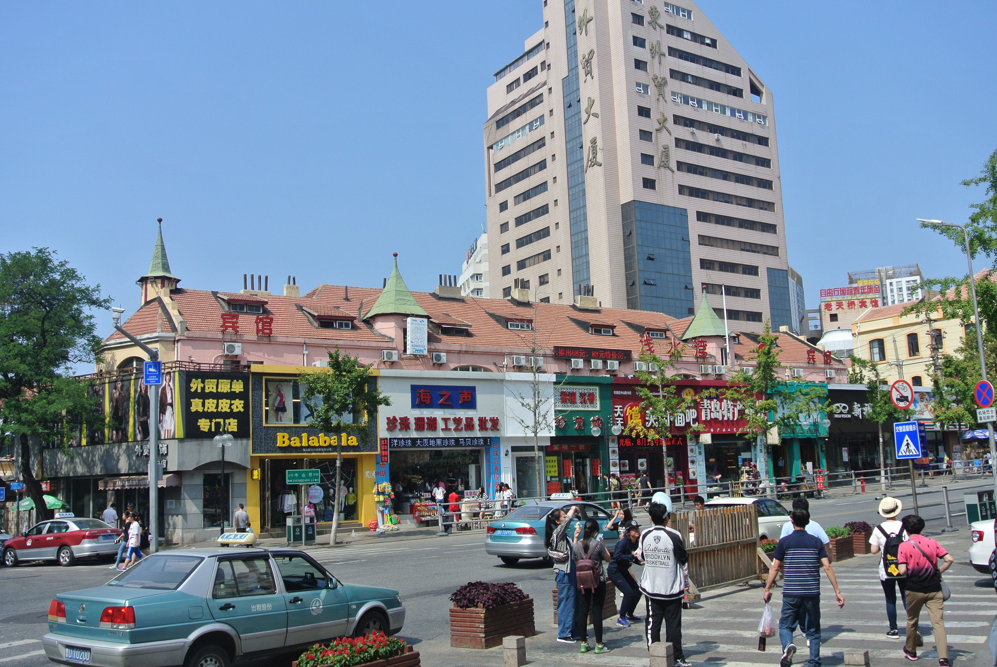 青岛中山路祥福洋行公寓旧址